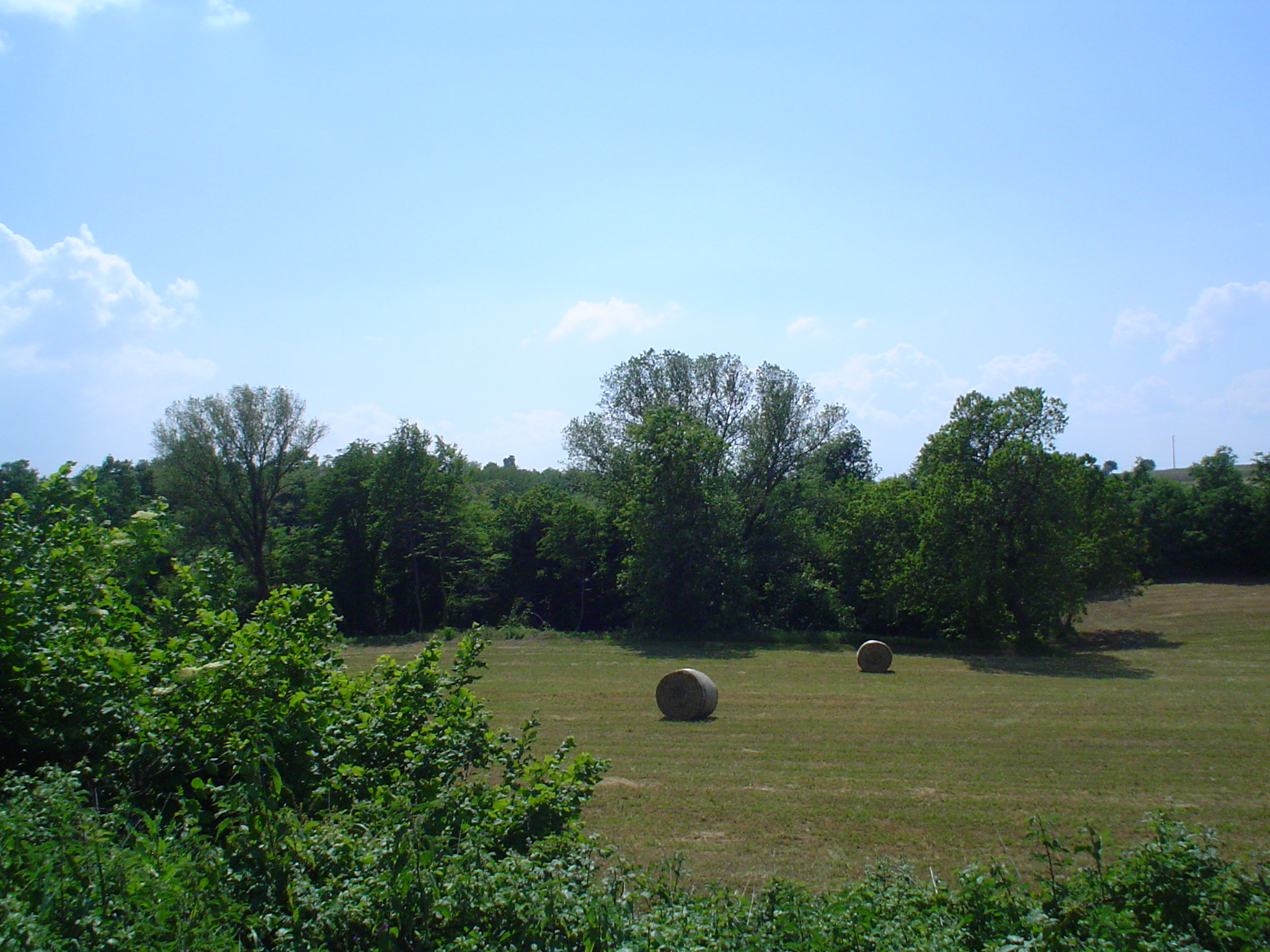 prato con balloni di fieno in lontananza